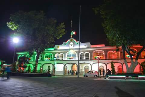 Alcaldía del municipio de Zacatelco durante las fiestas patrias de 2017